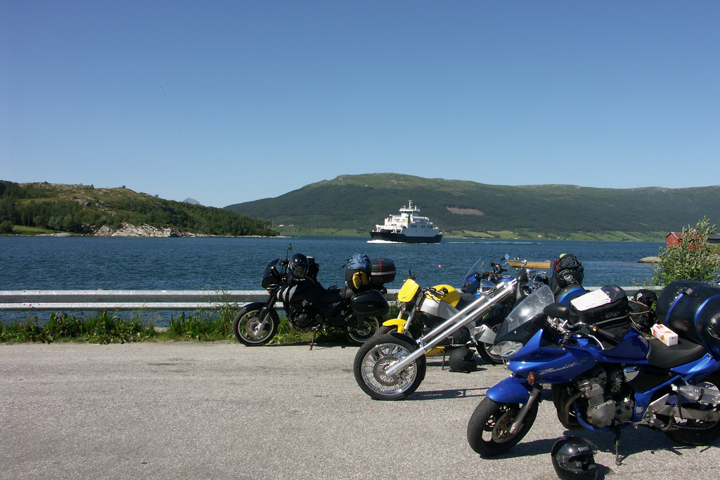 Frå ferjeleiet på Låvong (Levang) tvers over Ranfjorden, mot Strandlandet på Nesna, med ferja Petter Dass sentralt.